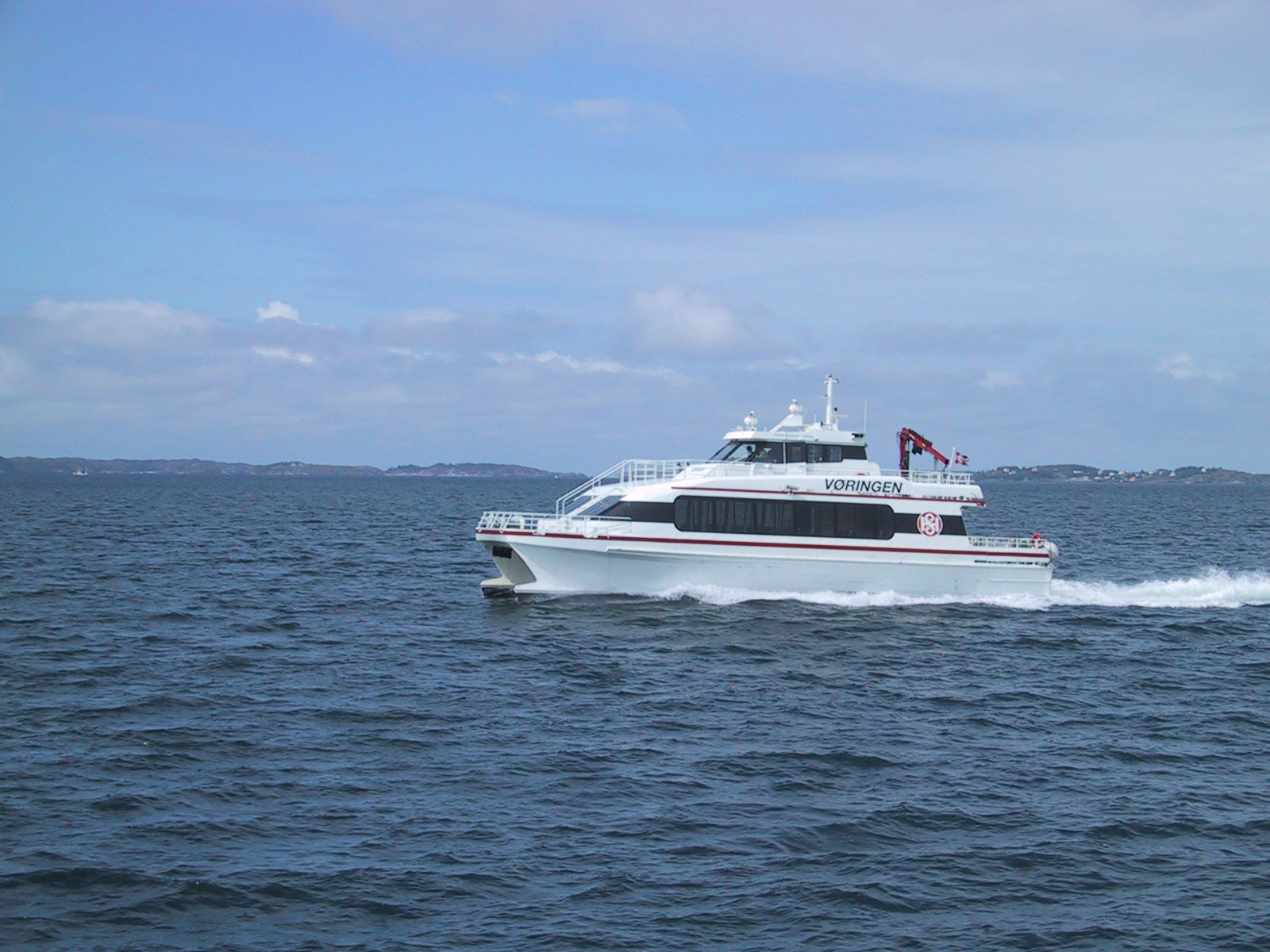 M/S Vøringen, built 1995.